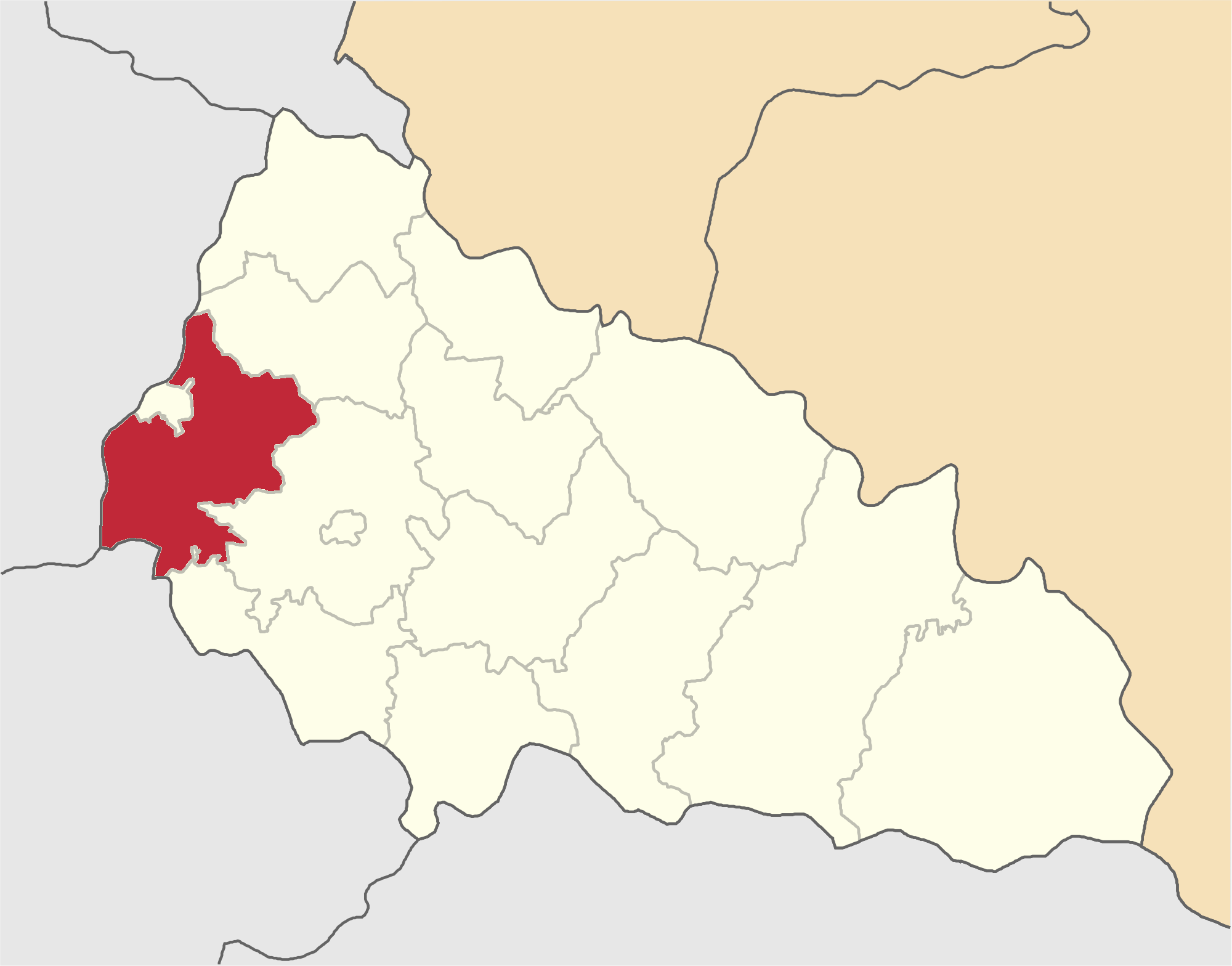 Uzhgorodskyi-Raion map